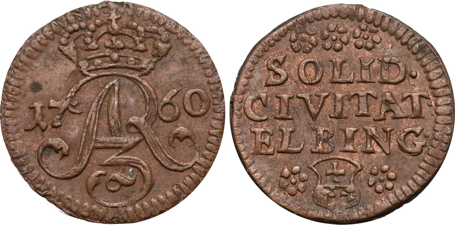 Szeląg miejski Elbląg 1760